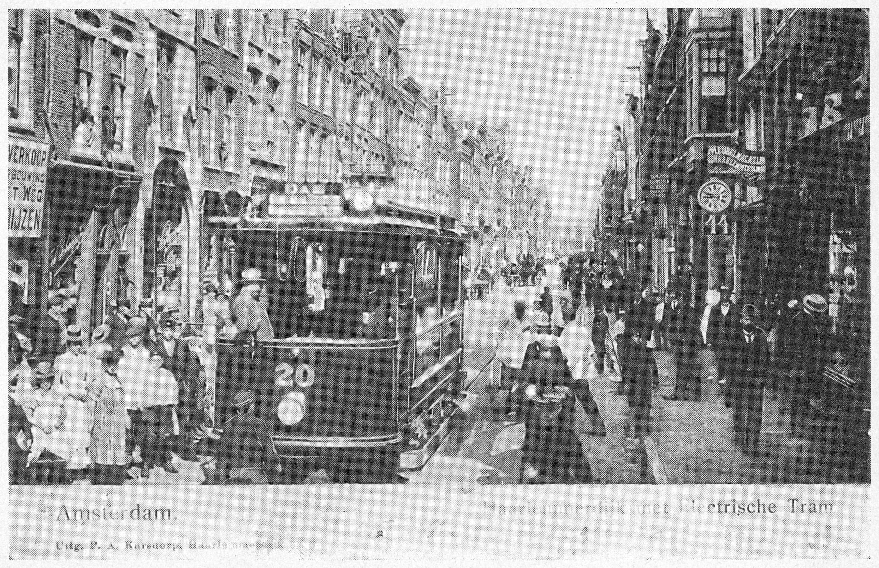 Photographed in Amsterdam between 1900 and 1914.